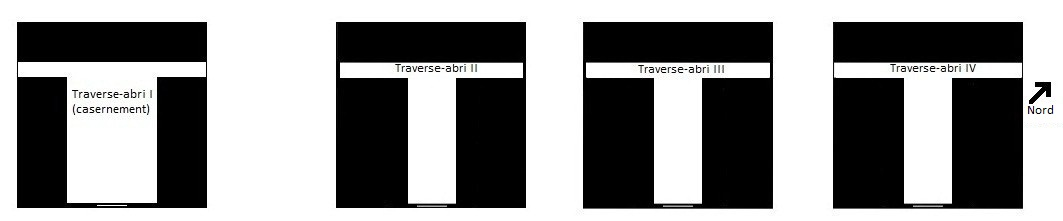 Plan des batteries ouest du fort de Planoise, à Besançon (Doubs, France).